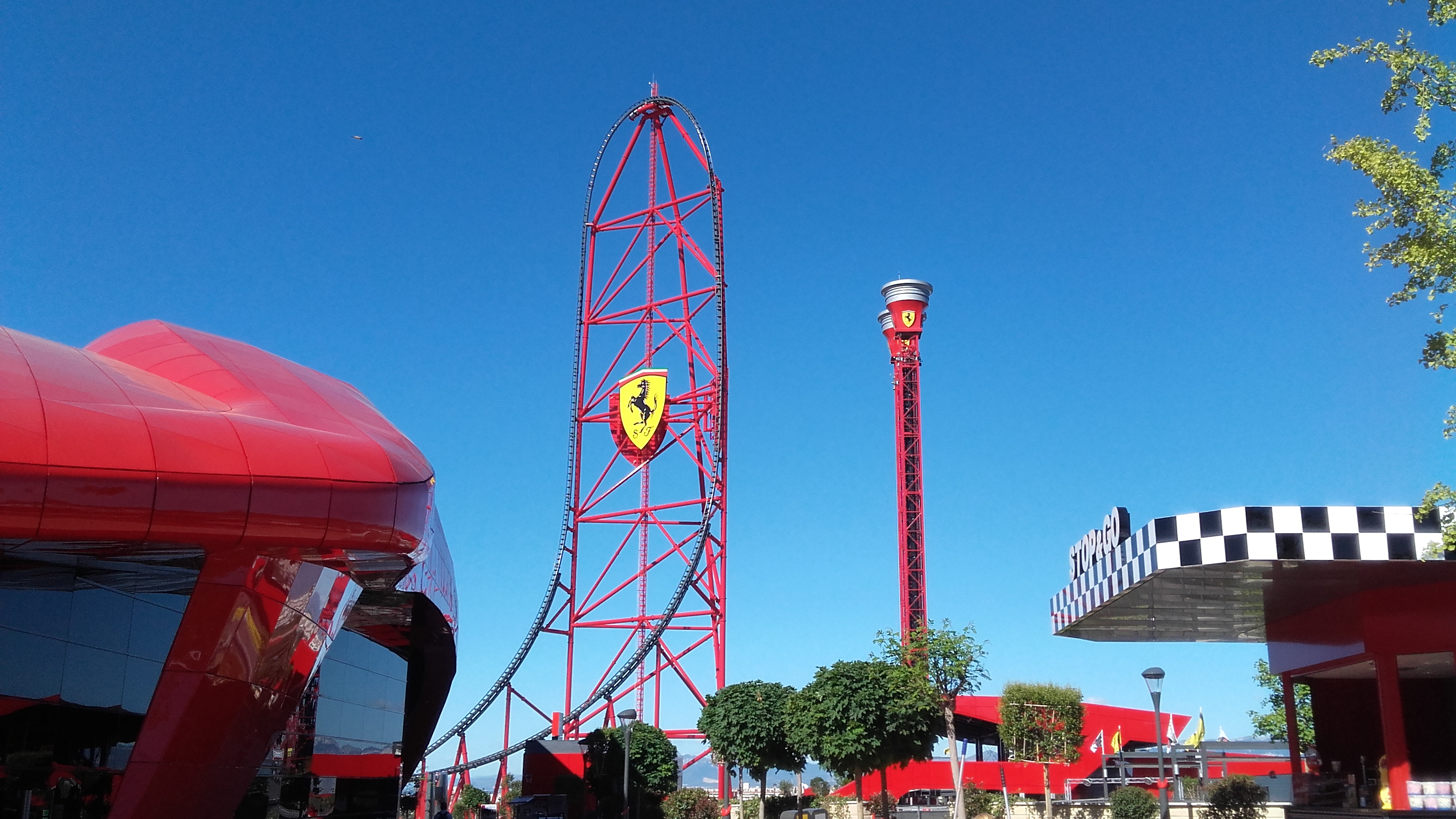 fl